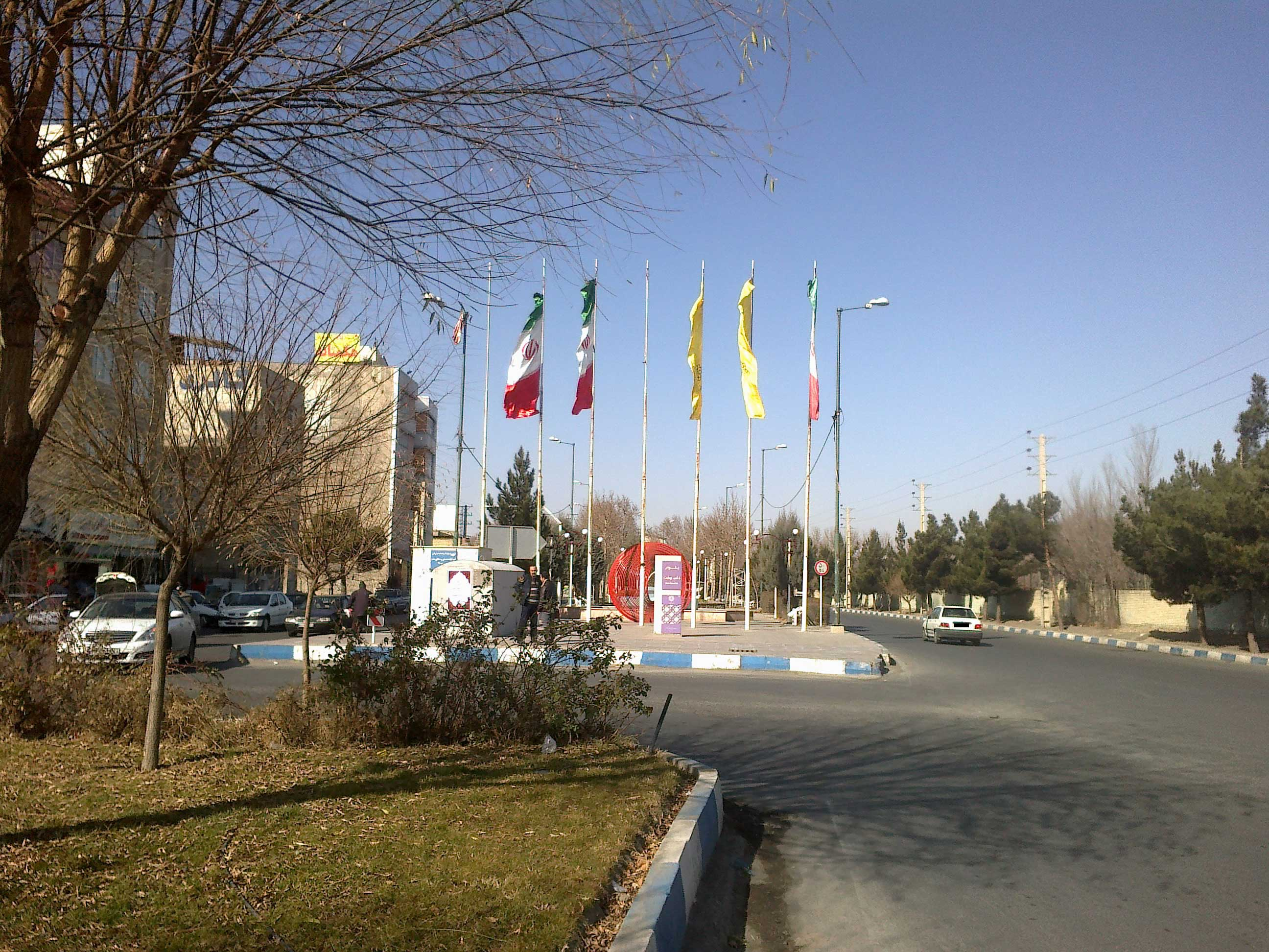 MeshkinAbad (BlackOasis city), Karaj, Iran